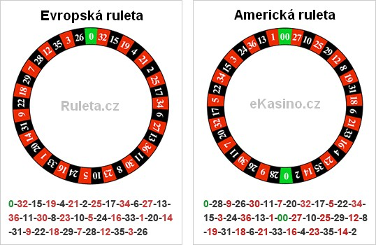 Rozdíl v číslování evropské a americké rulety